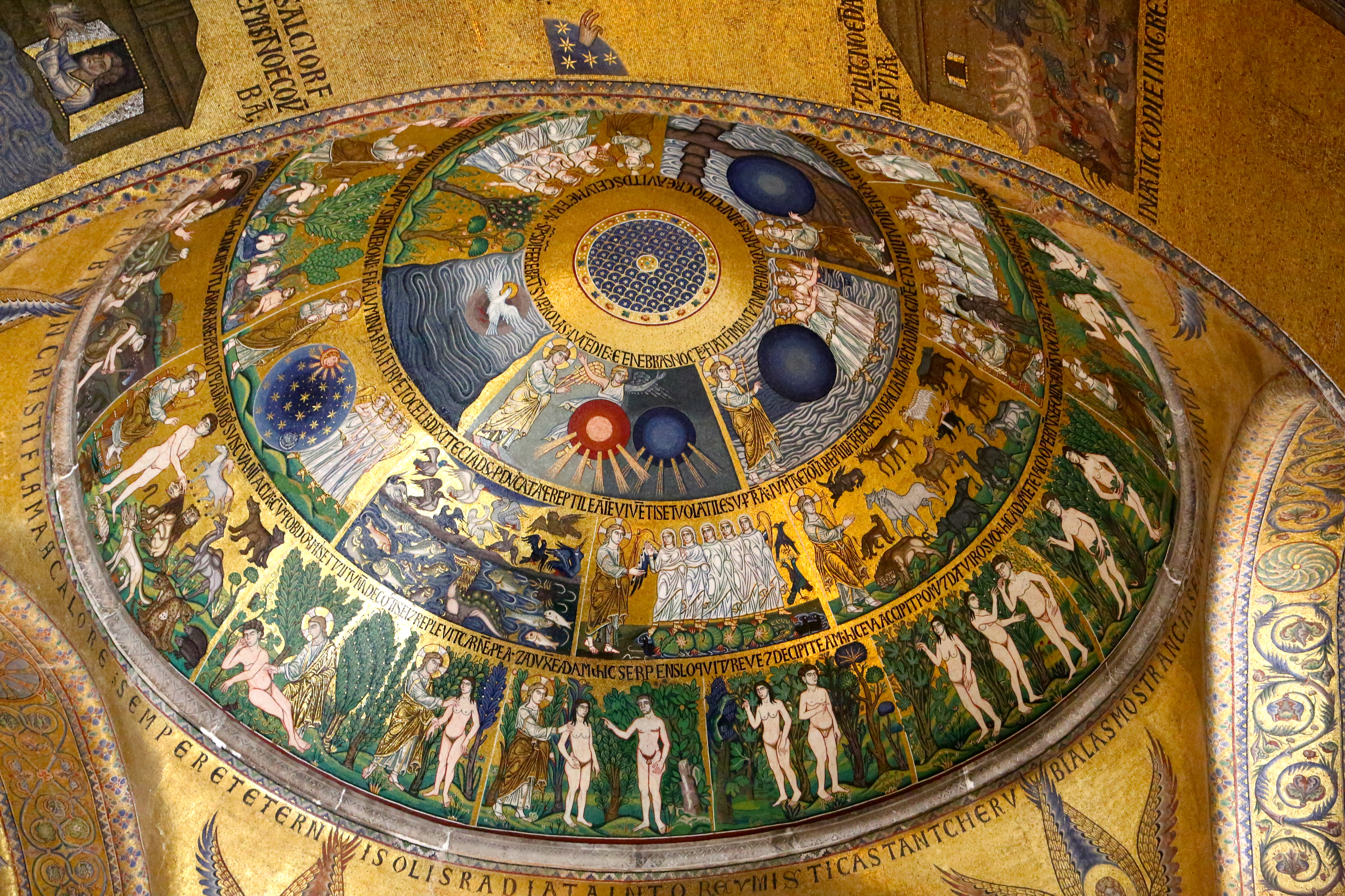 0O3A9661